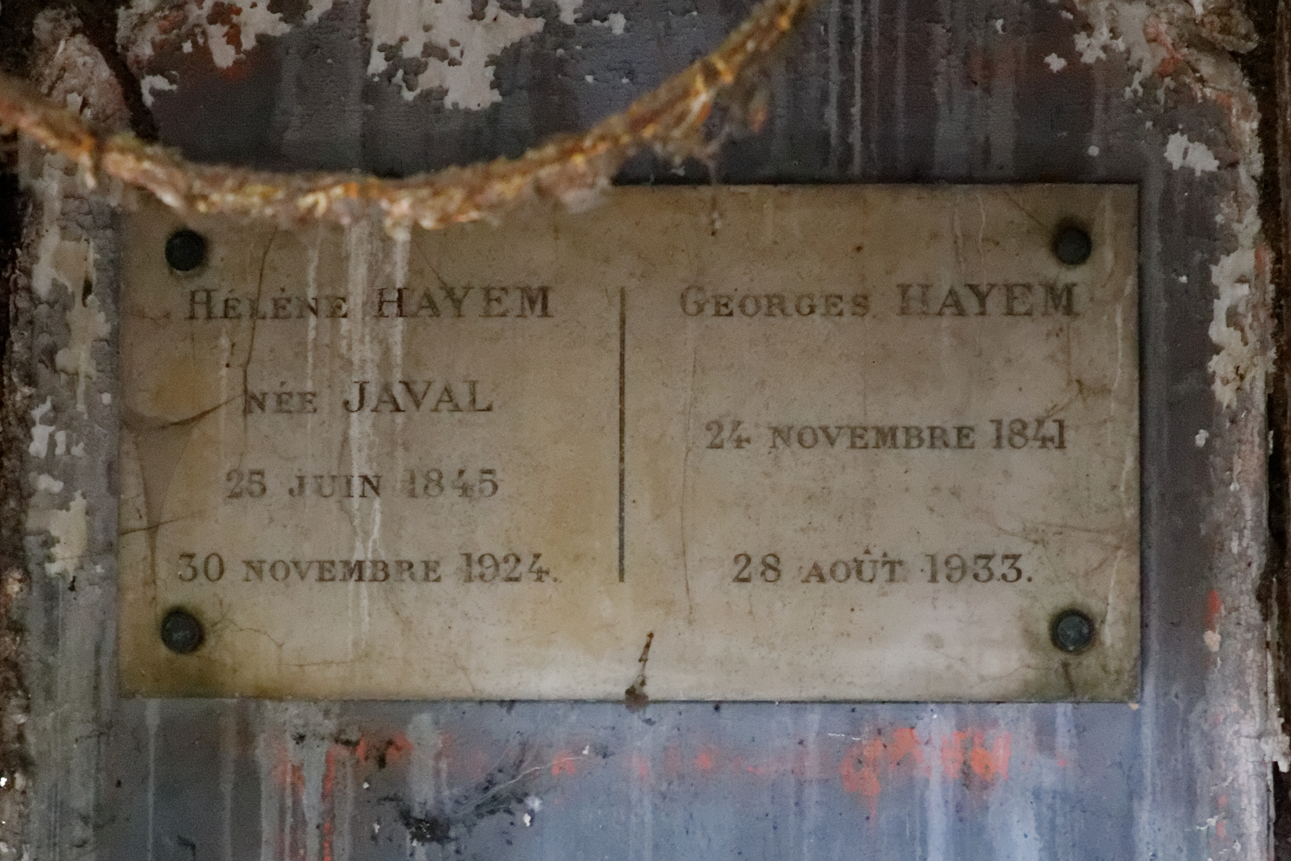 Inscriptions